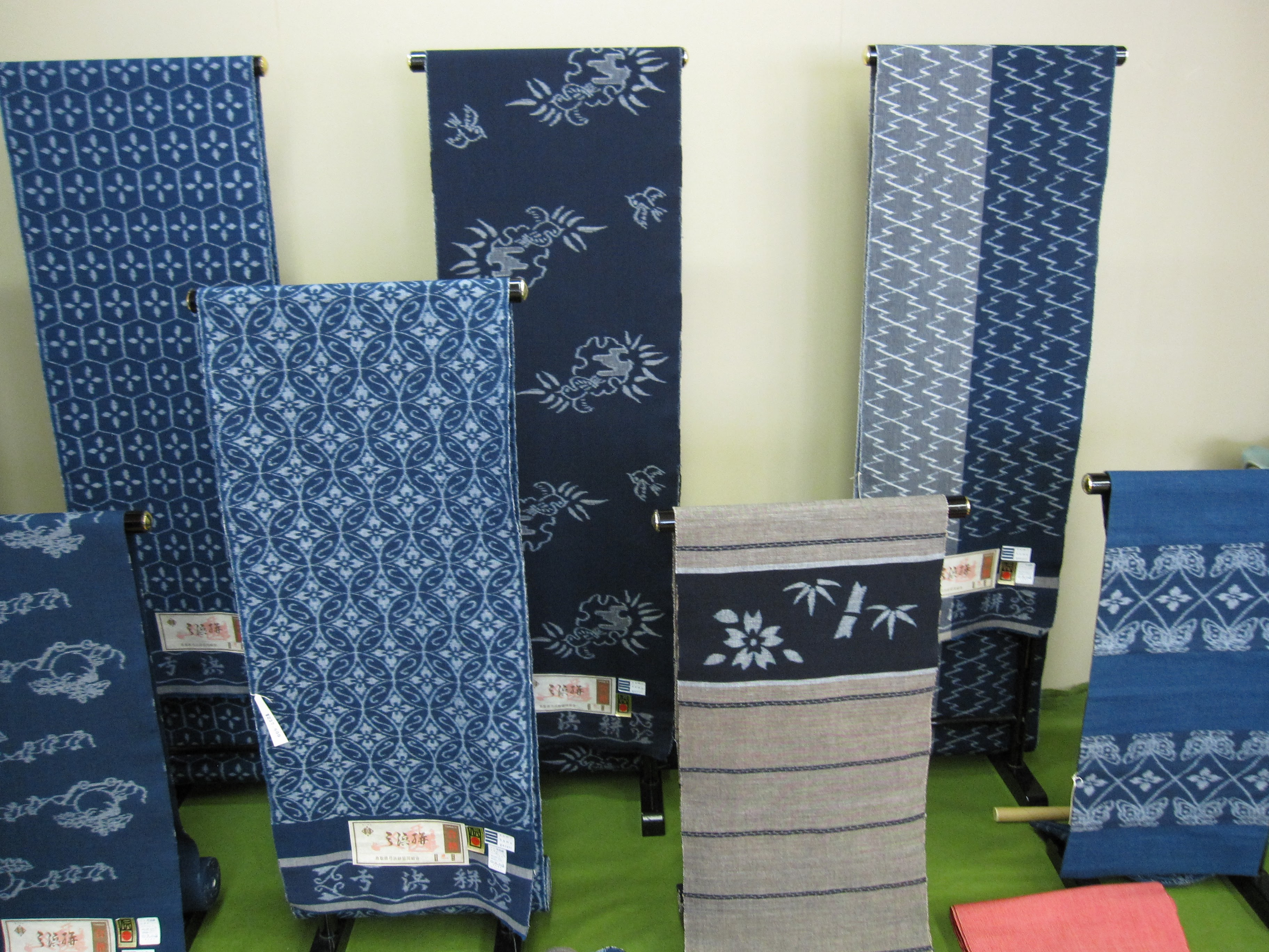 弓浜絣、アジア博物館井上靖記念館（鳥取県米子市）の特別展で撮影